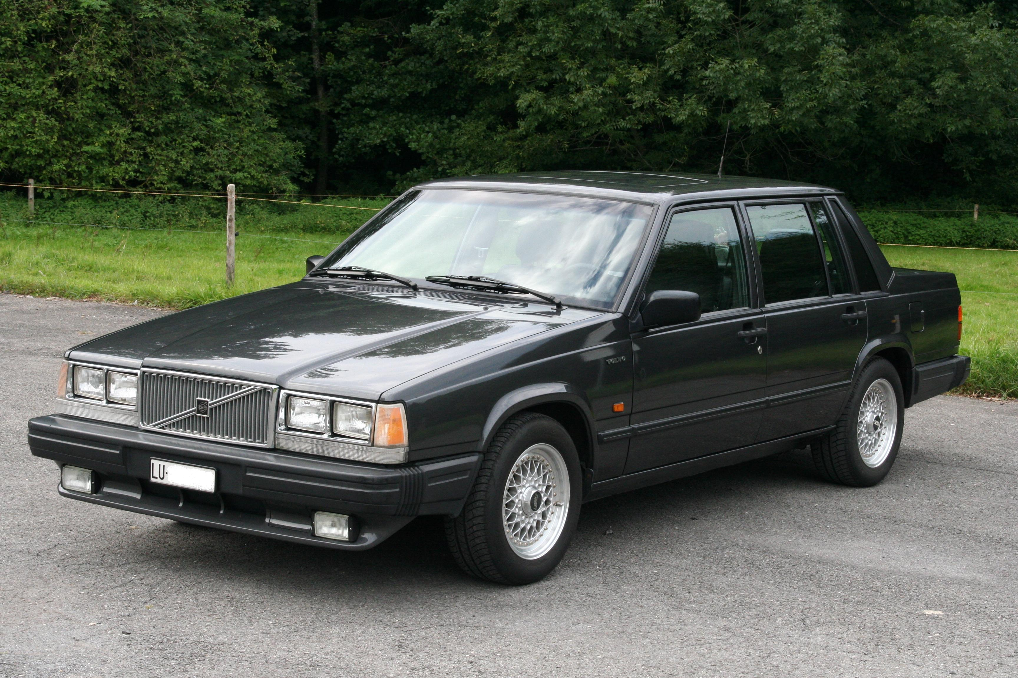 Volvo 740 GLT 1989 US-Version